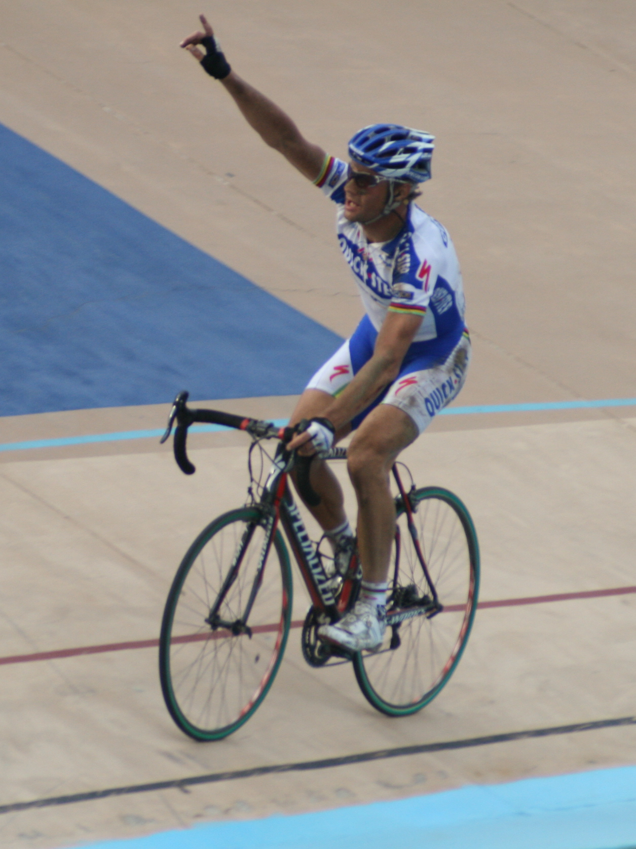 Paris-Roubaix 2009 : Tom Boonen à l'arrivée au vélodrome de Roubaix